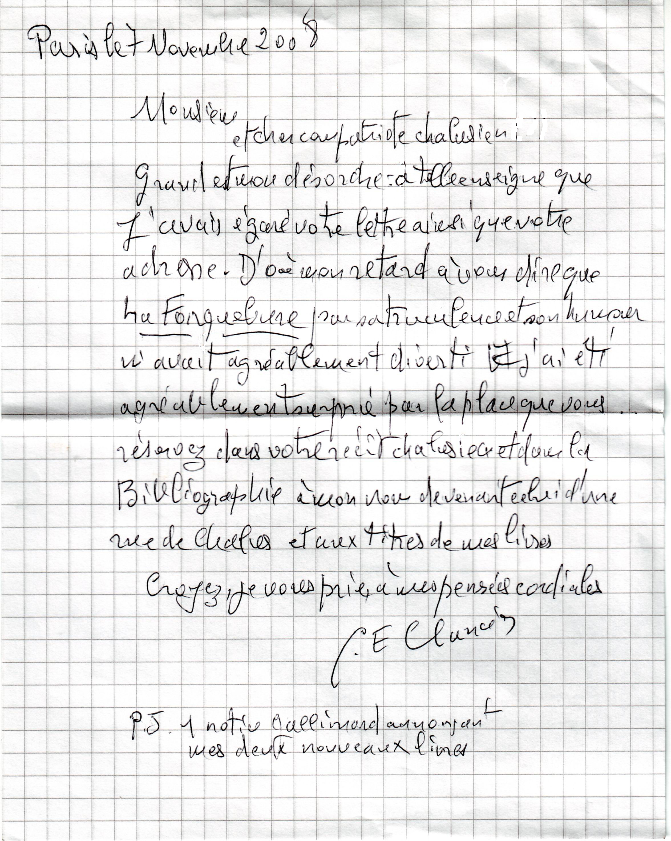 Courrier de Georges Emmanuel Clancier sur la Fonquebure